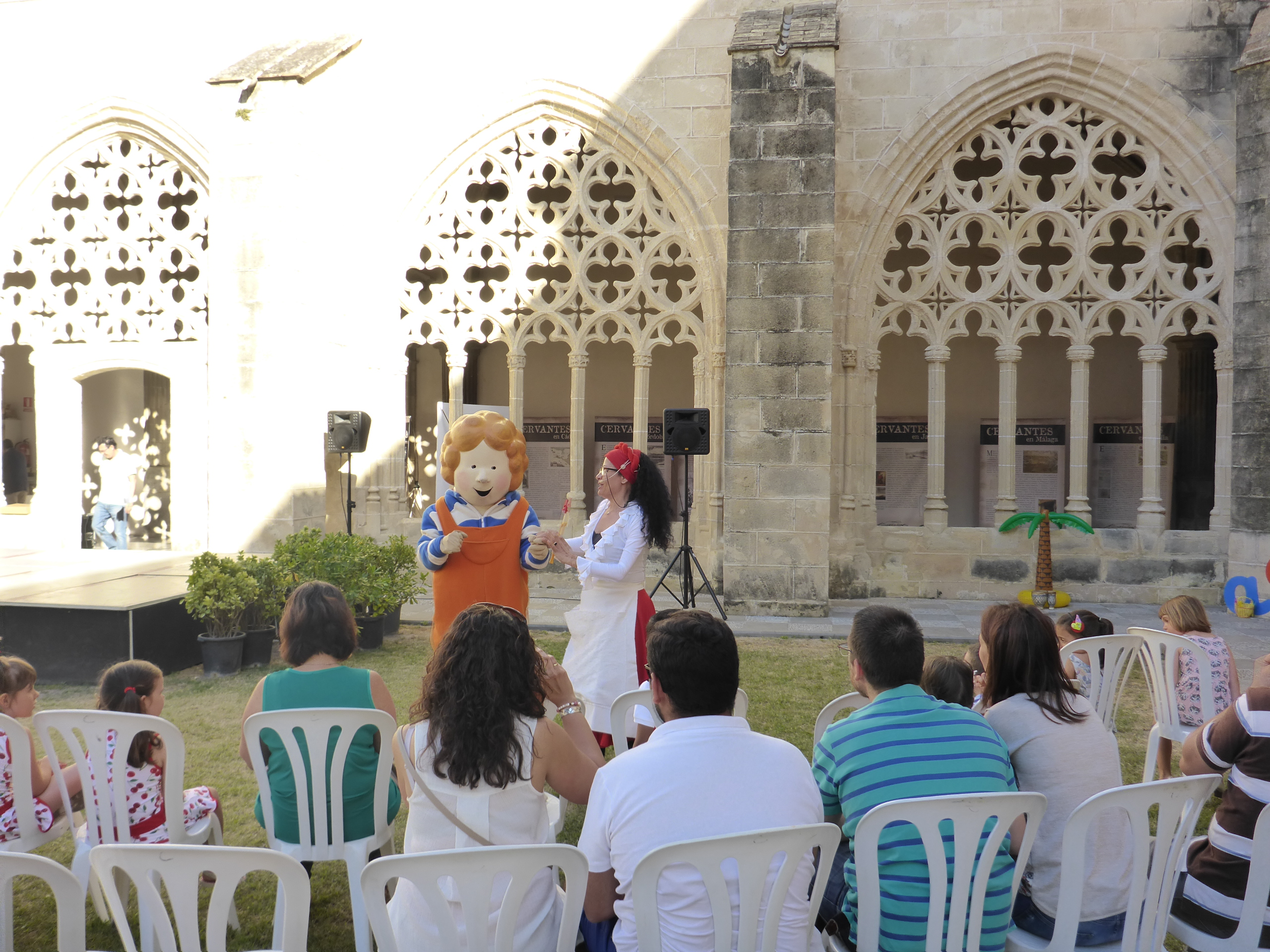 Feria del Libro de Jerez de la Frontera 2016 (Andalucía, España)